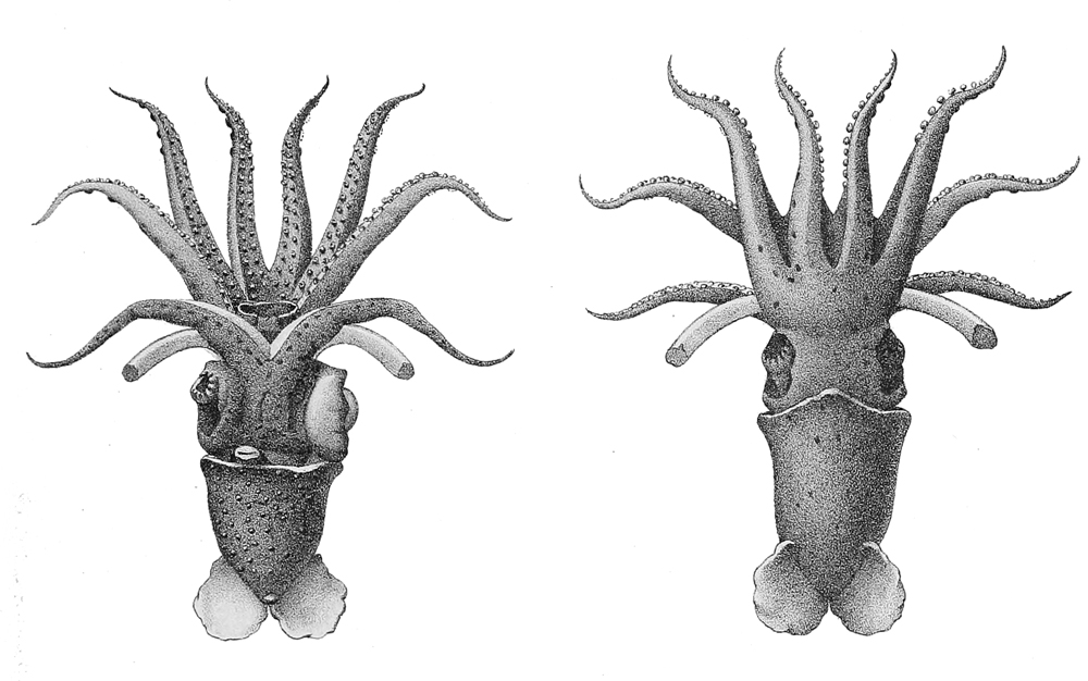 Histioteuthis bonnellii